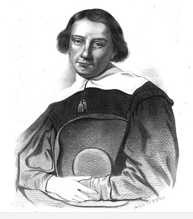 Portret van Passchier de Fijne (1588-1667)